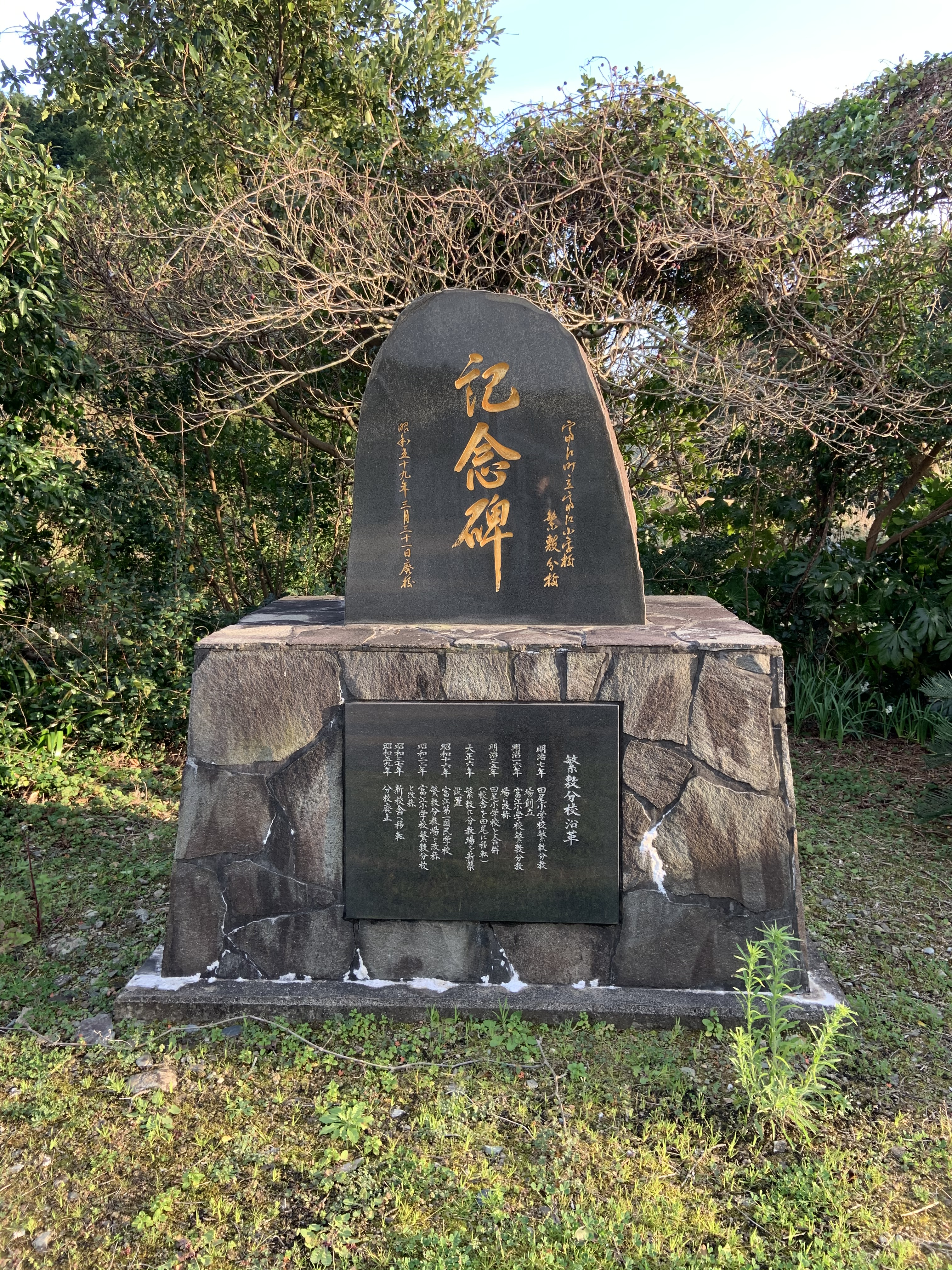 五島市立富江小学校繁敷分校（廃校）跡地記念碑